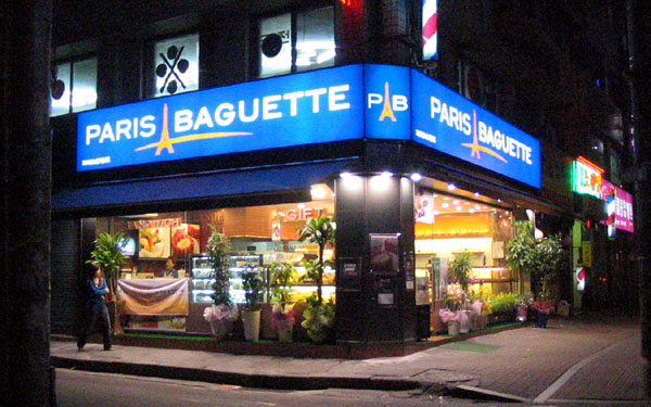 파리바게뜨, 서울특별시 영등포구 대림3동에 있는 가맹점.